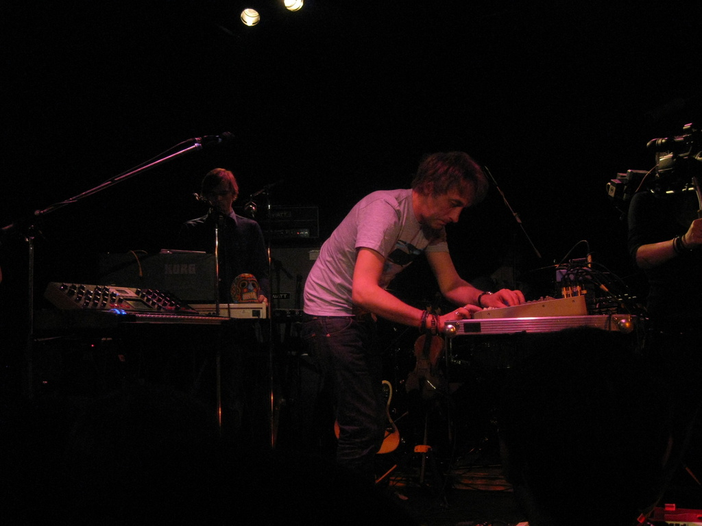 Festsaal Kreuzberg / Berlin / May 13th 2010